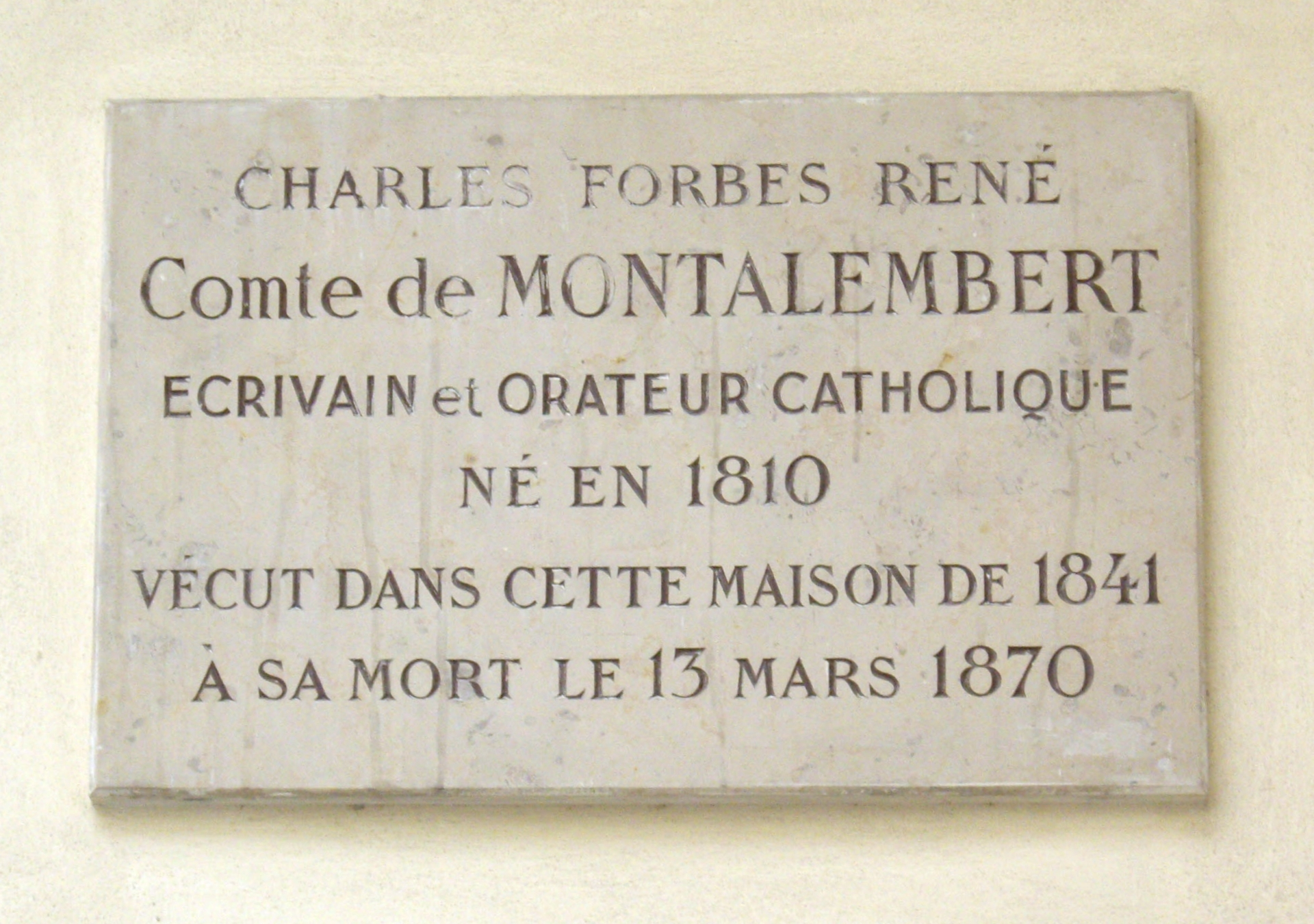 Plaque commémorative, 5 impasse de Valmy, Paris 7e. « Charles Forbes René, comte de Montalembert, écrivain et orateur catholique, né en 1810, vécut dans cette maison de 1841 à sa mort, le 13 mars 1870. »